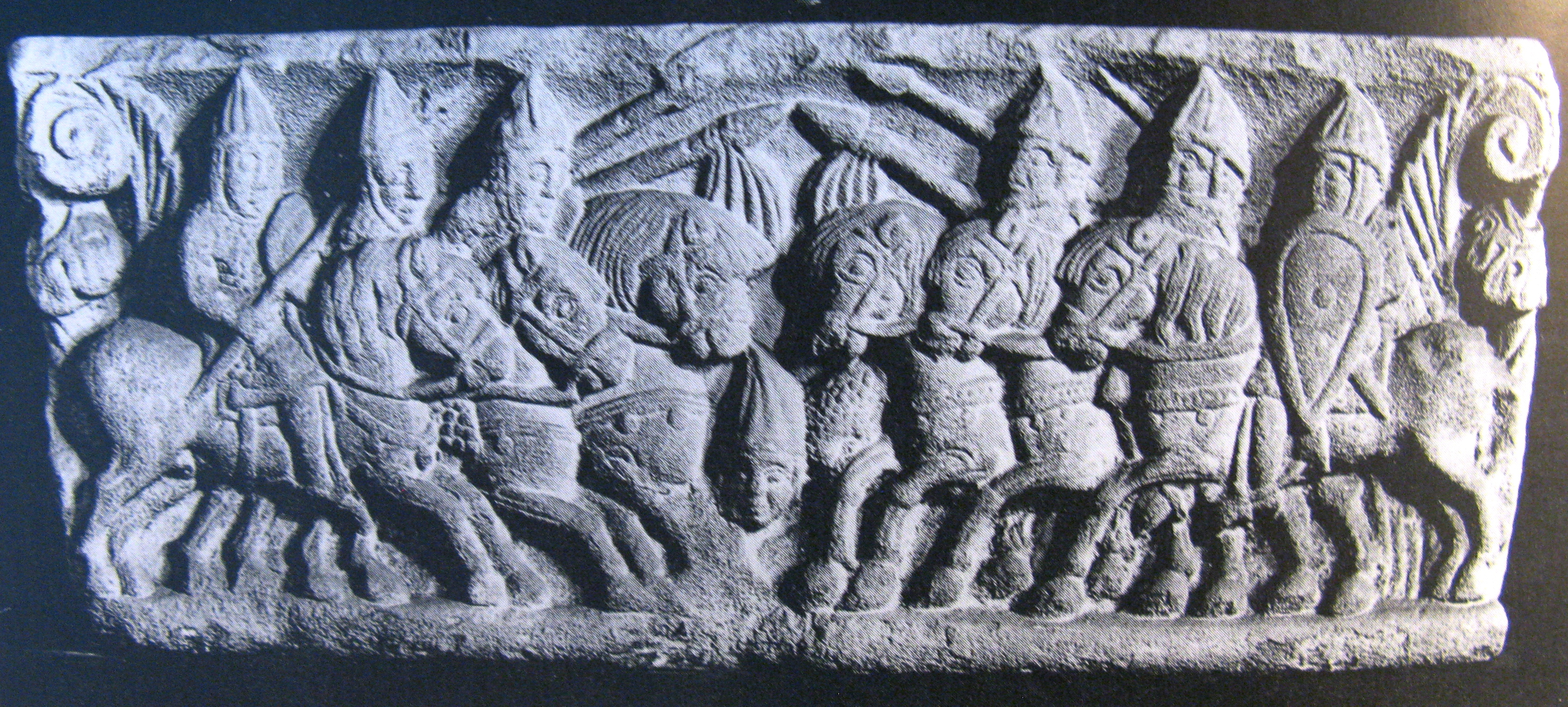 Pavia, capitello raffigurante uno scontro tra cavalieri, XII secolo, Musei Civici